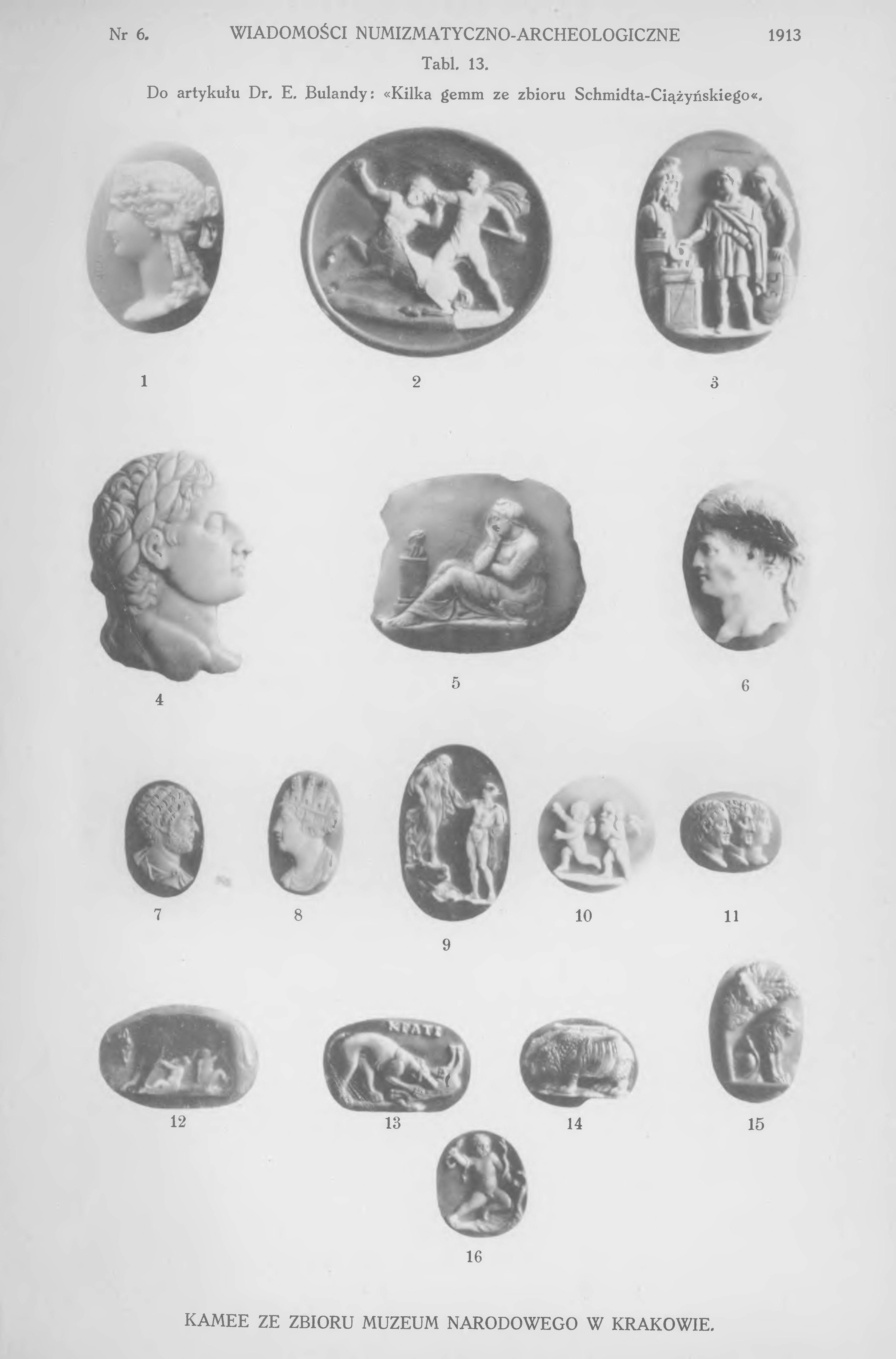 Przykładowe kamee ze zbioru Konstantego Schmidta-Ciążyńskiego